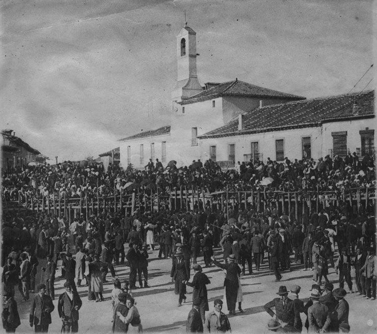 Baile popular - Olmedo (Valladolid) - Baile popular en la plaza mayor de Olmedo. - Fotografía 186 x 164 B/N